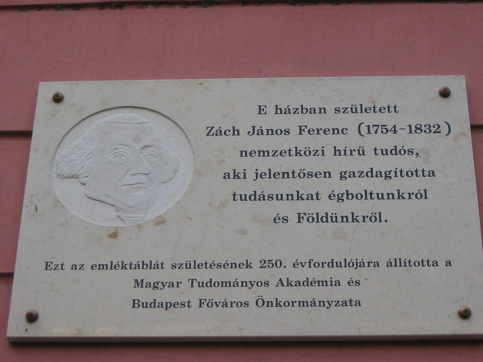 Zách János Ferenc emléktáblája Budapesten. V. kerület, Gerlóczy utca 2.